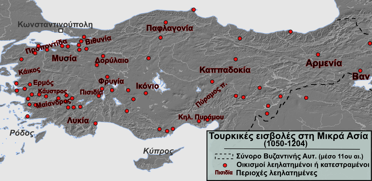 Λεηλασίες και καταστροφές οικισμών στη Μικρά Ασία ως αποτέλεσμα του πρώτου κύματος των εισβολών τουρκικών φύλων (περ. 1050-1204)